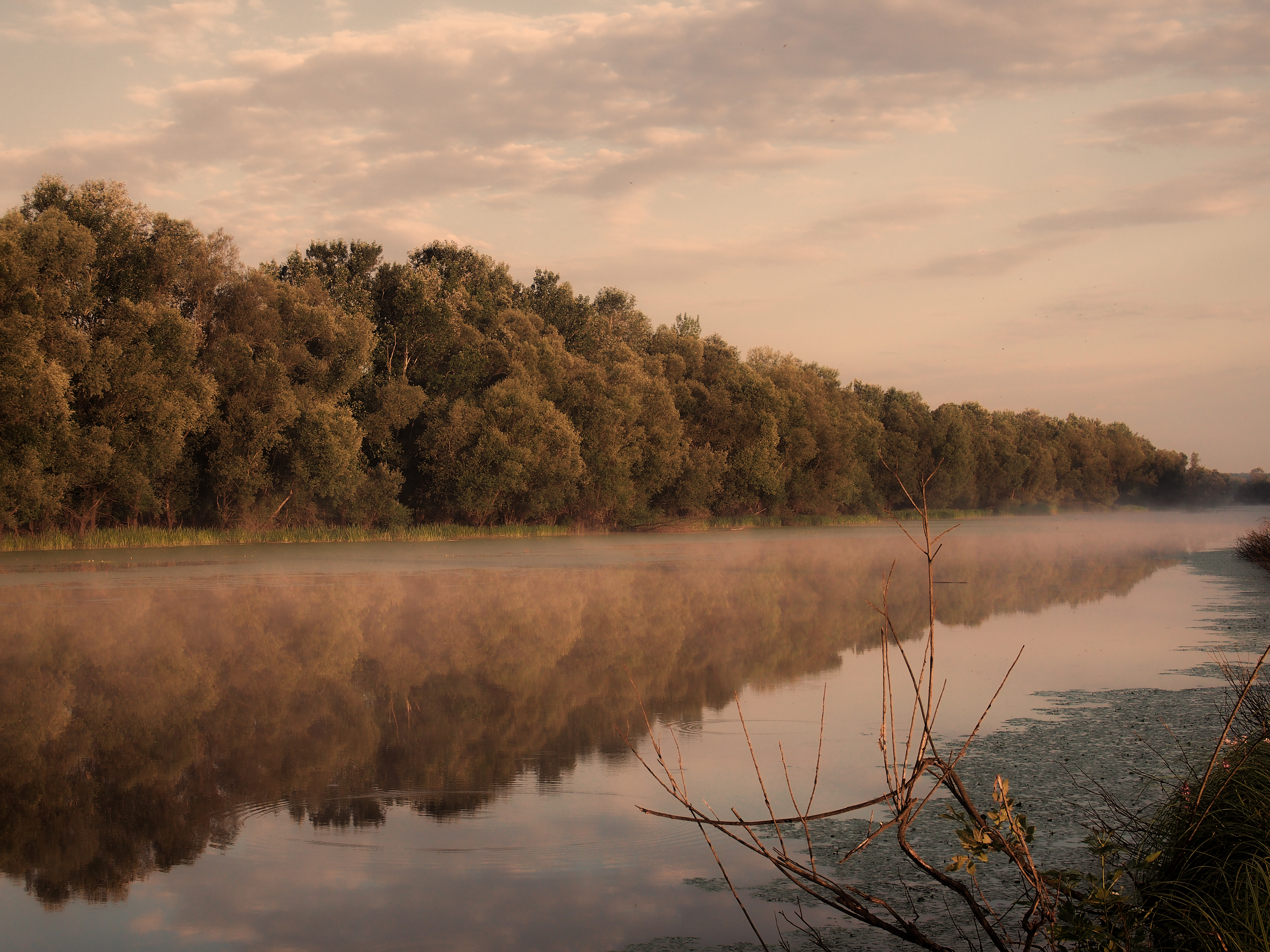 Lonjsko polje This is a a photo of a natural area in Croatia with ID: PP04